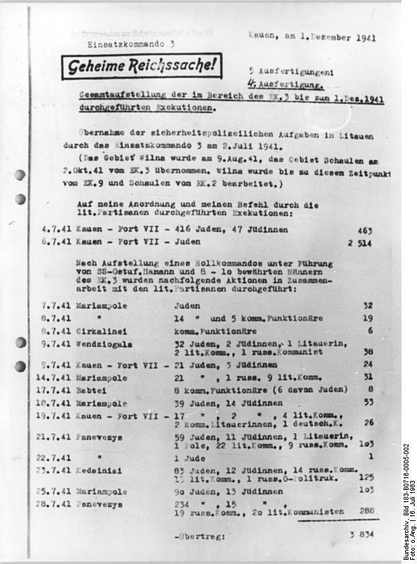 Oberstes Gericht, Globke-Prozess, Beweisstück Zentralbild 16.7.1963 Dokumente über faschistische Greuel aus der UdSSR. UBz: Reproduktion der auszugsweise während des 7. Verhandlungstages des Globke-Prozesses am 15. Juli verlesenen Dokumente über faschistische Greuel in der Sowjetunion. Pedantisch genau zieht hier ein SS-Standartenführer Jäger die grausige Bilanz: "In Litauen gibt es keine Juden mehr." (siehe auch 3 - 10N)